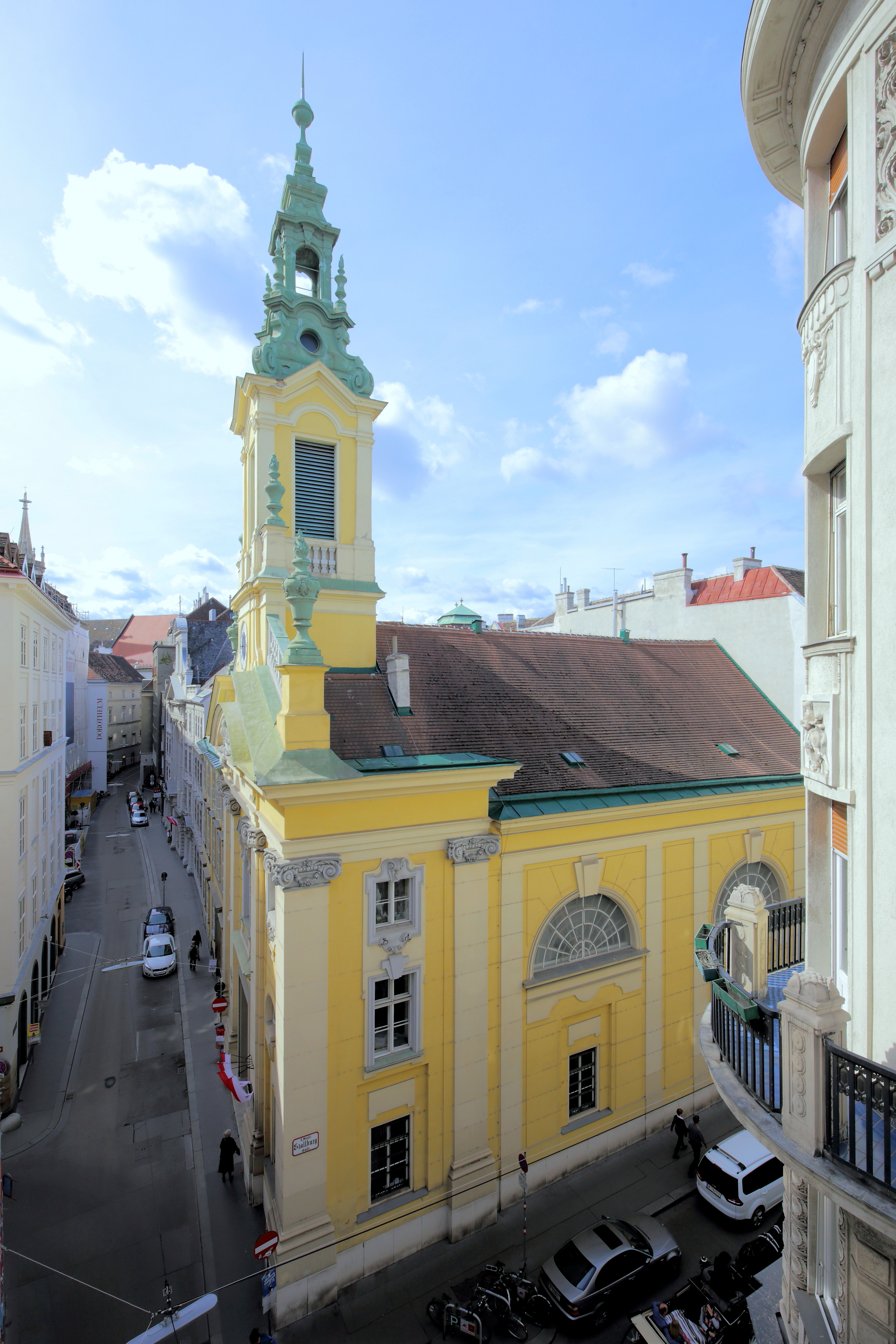 Nordostansicht der Reformierten Stadtkirche im 1. Wiener Gemeindebezirk Innere Stadt.Aufgrund des Toleranzpatentes (1781) kaufte die evangelische Gemeinde H.B. 1782 das Wirtschaftsgebäude des zwangsweise (Josephinische Kirchenreformen) aufgelassenen Königinklosters (Kloster der Klarissen) und errichtete darauf nach Plänen des Architekten Gottlieb Nigelli von 1783 bis 1784 eine Kirche (Bethaus) im klassizistischen Stil, die von außen als Kirchen nicht erkennbar sein durfte. Nach dem Erlaß des Protestantenpatentes (Gleichstellung mit der röm.-kath. Kirche, 1861) wurde die Kirche (Bethaus) nach Plänen des Architekten Ignaz Sowinski 1887 in neobarocken Stil umgebaut. Unter anderem erhielt die Kirche einen Kirchturm und ein Hauptportal zur Dorotheergasse hin.